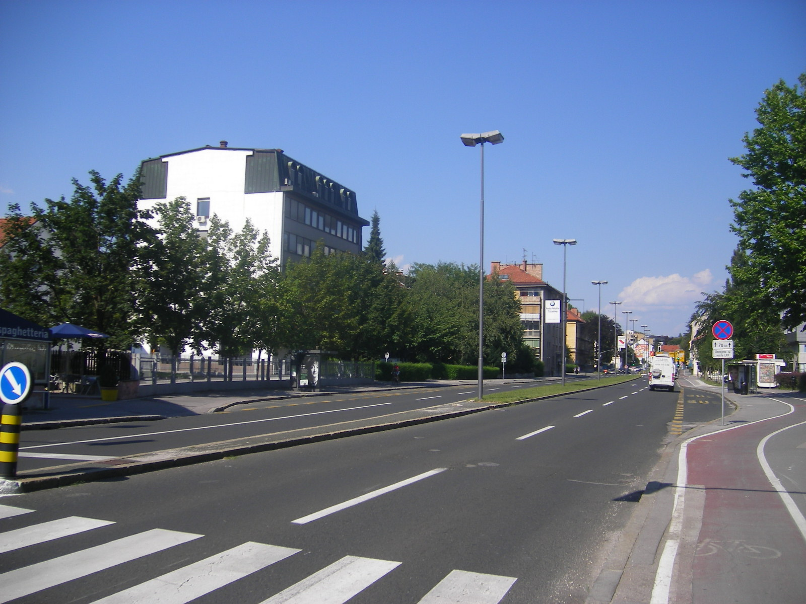 Ljubljana - Tržaška Cesta